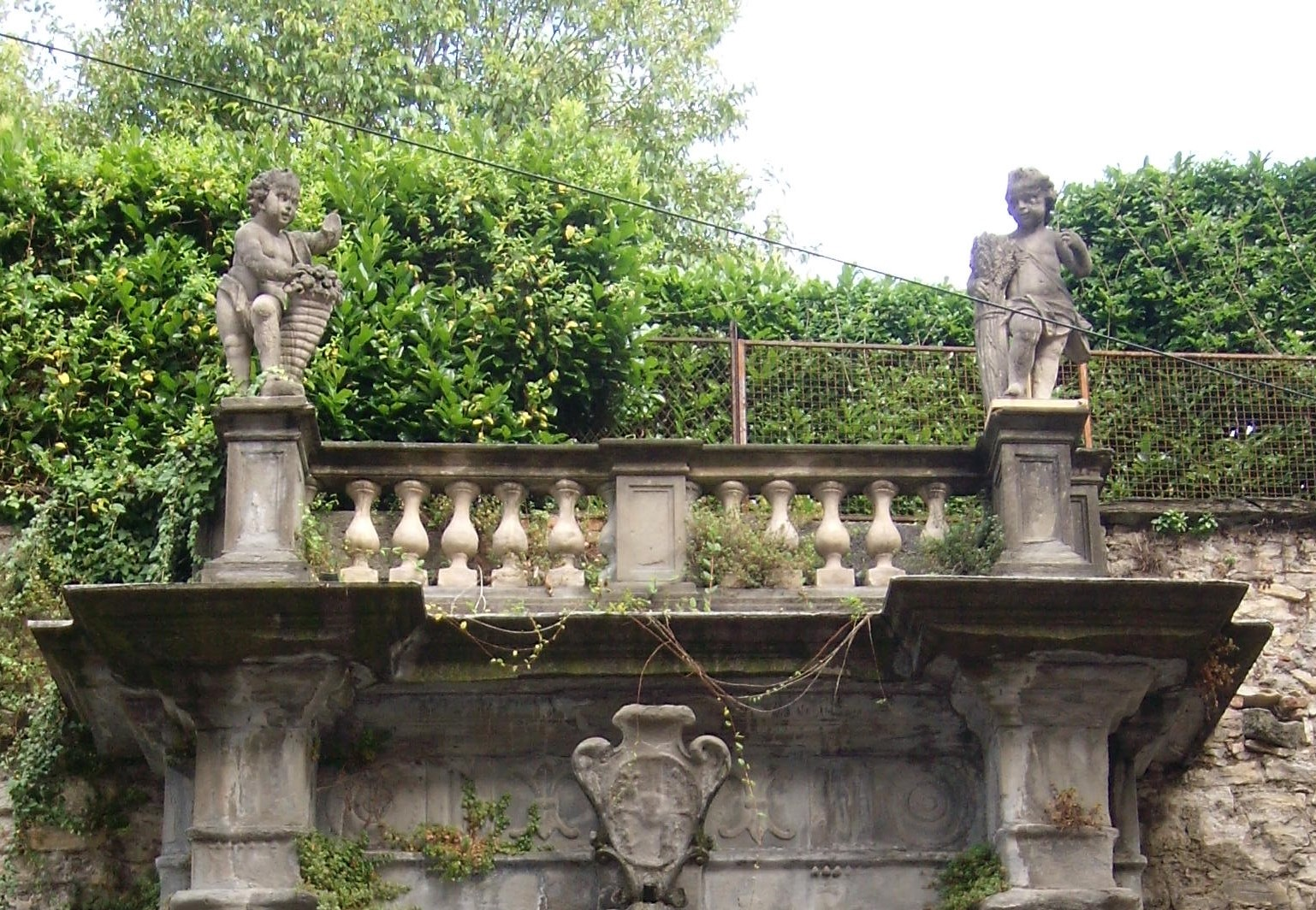 Putti rappresentanti l'estate e la primavera sulla nicchia di fronte a palazzo Terzi